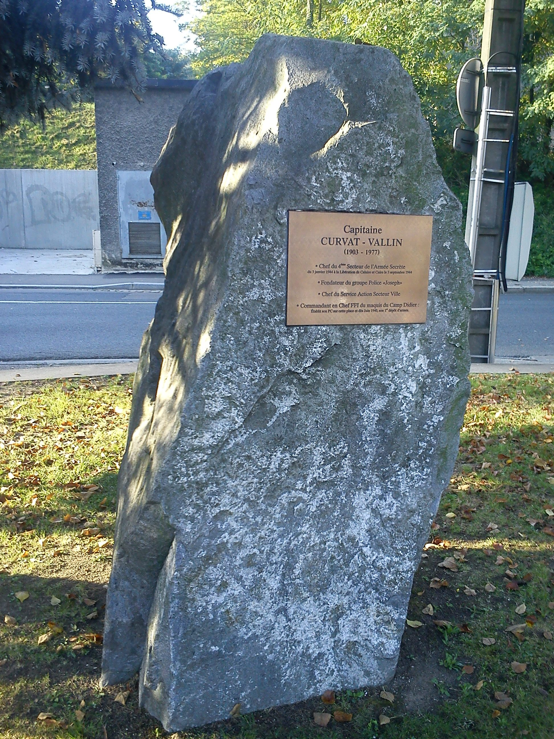 Plaque commémorative rendant hommage au Capitaine CURVAT-VALLIN (1903-1977) à Caluire-et-Cuire. Chef du 4ème Secteur de l'Armée Secrète du 3 janvier 1944 à la Libération de Caluire et Cuire le 3 septembre 1944 Fondateur du groupe Police "Joseph" Chef du Service Action Secteur Ville Commandant en Chef FFI du maquis du Camp Didier: Établit son PC sur cette place et dès Juin 1940, son 1er dépôt d'armes.